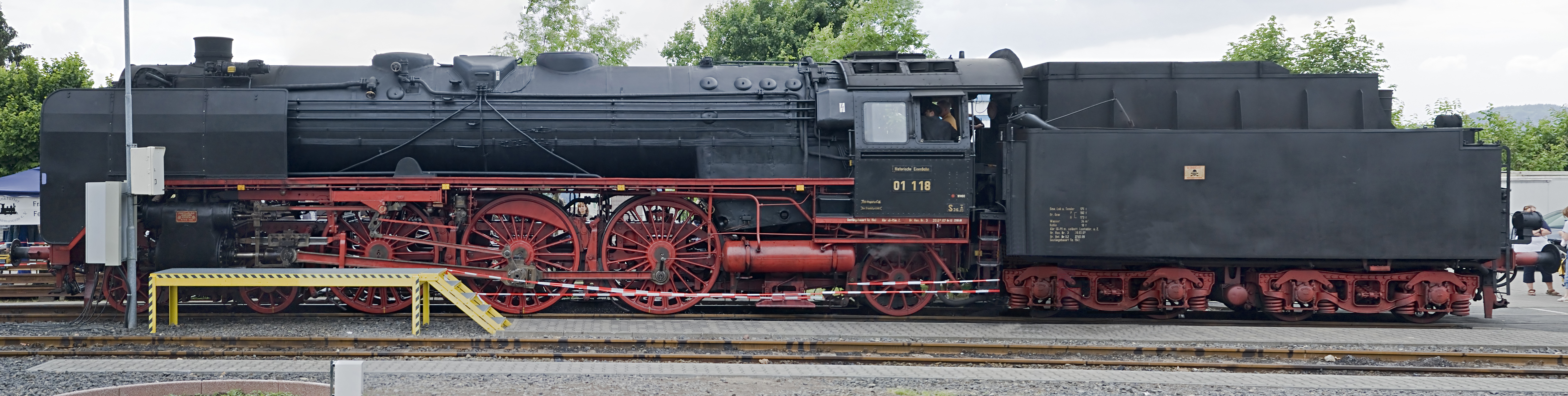 01 118 der Historischen Eisenbahn Frankfurt